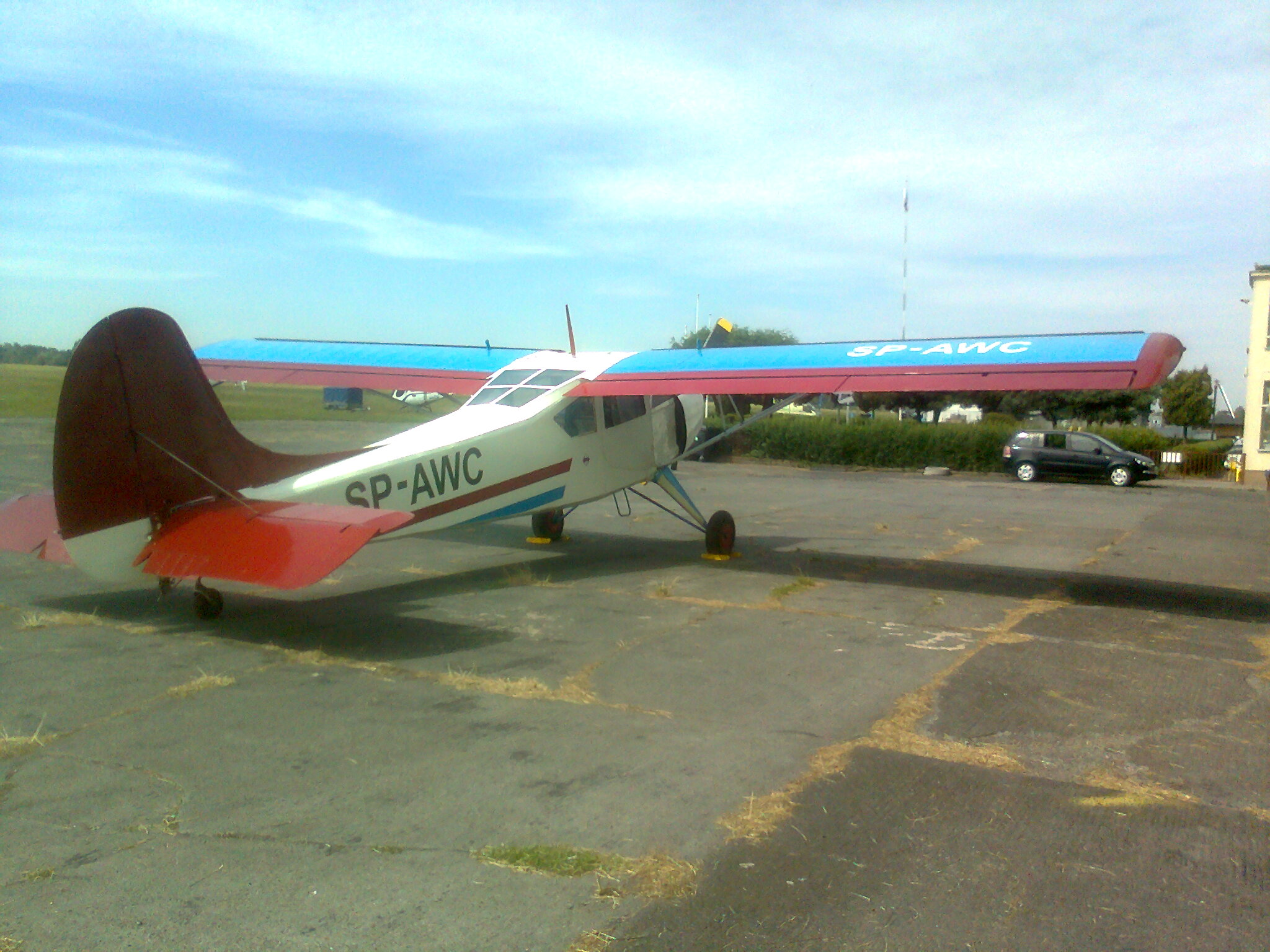 Jak 12M SP-AWC - Sekcja Samolotowa Aeroklubu Gliwickiego